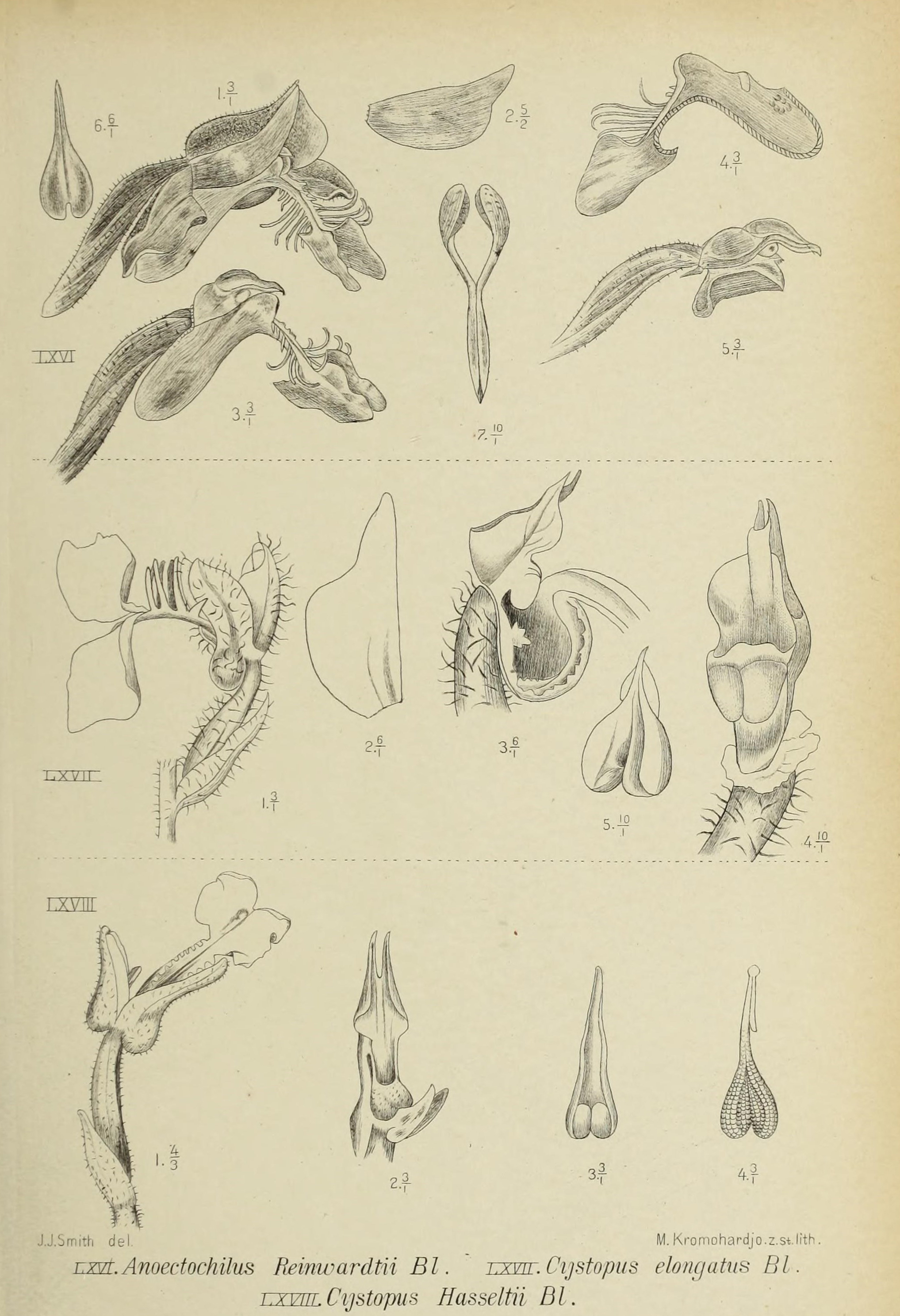 Die orchideen von Java /